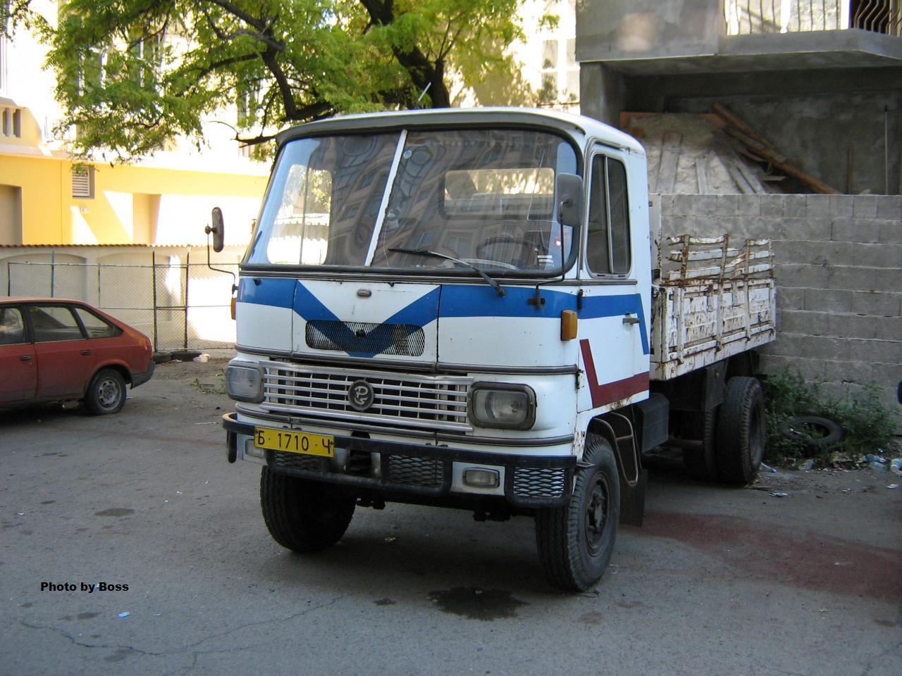 Автомобил Преслав